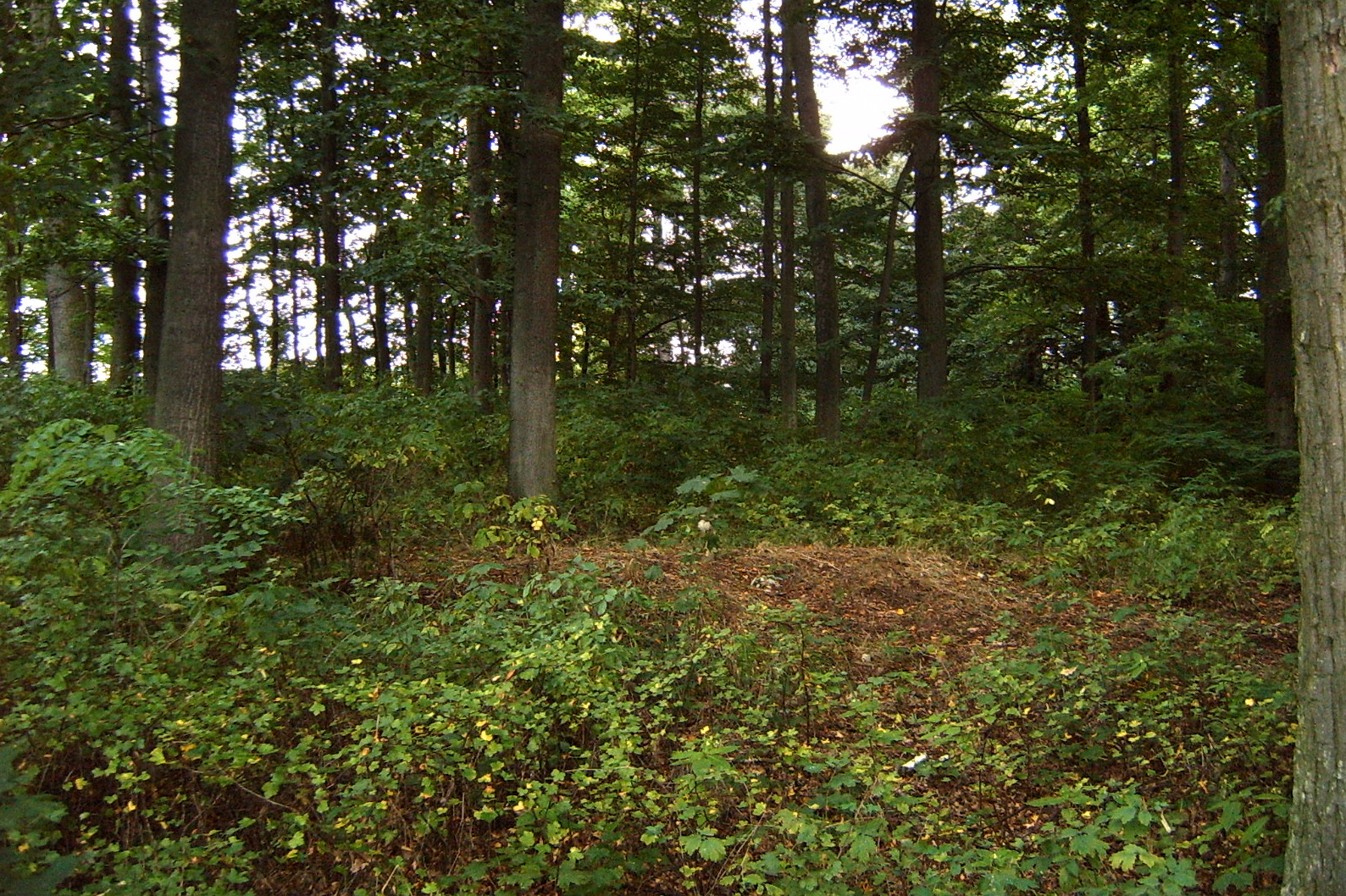 Střed staveniště hradu zarostlý lesem